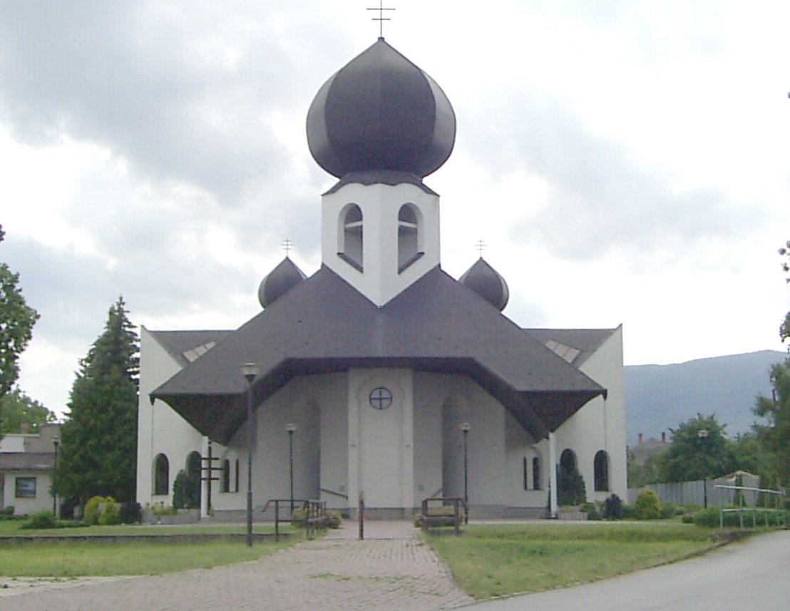 Sečovská Polianka, Grécko-katolícky kostol